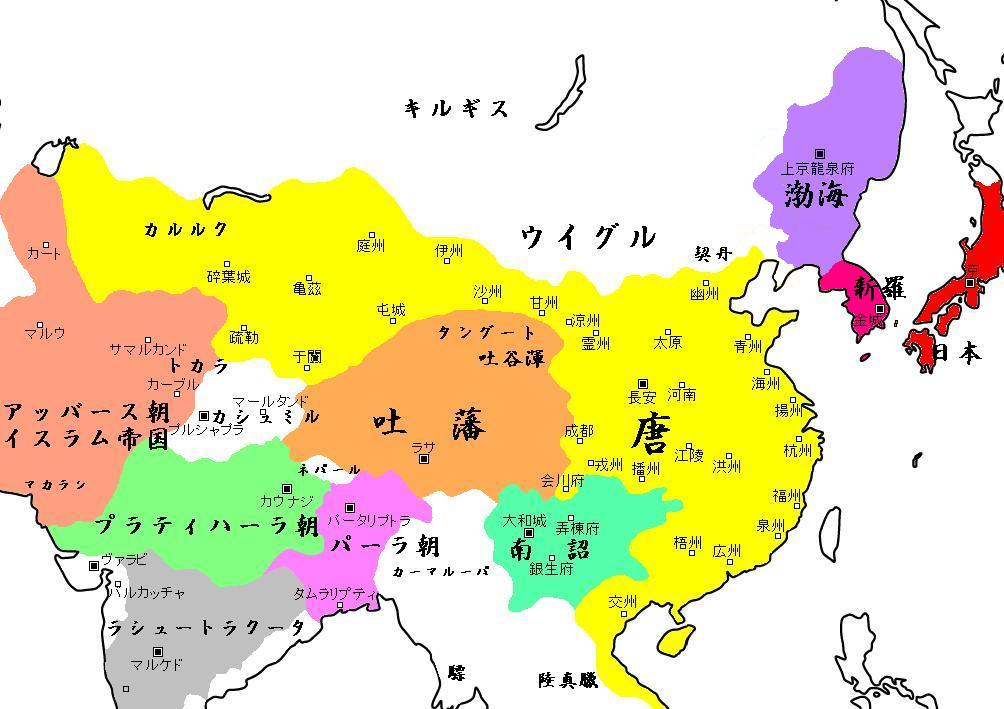 唐帝国地図. 八世紀大唐帝国･･･「画像:Smaller map of China.png」を加工させていただきました。